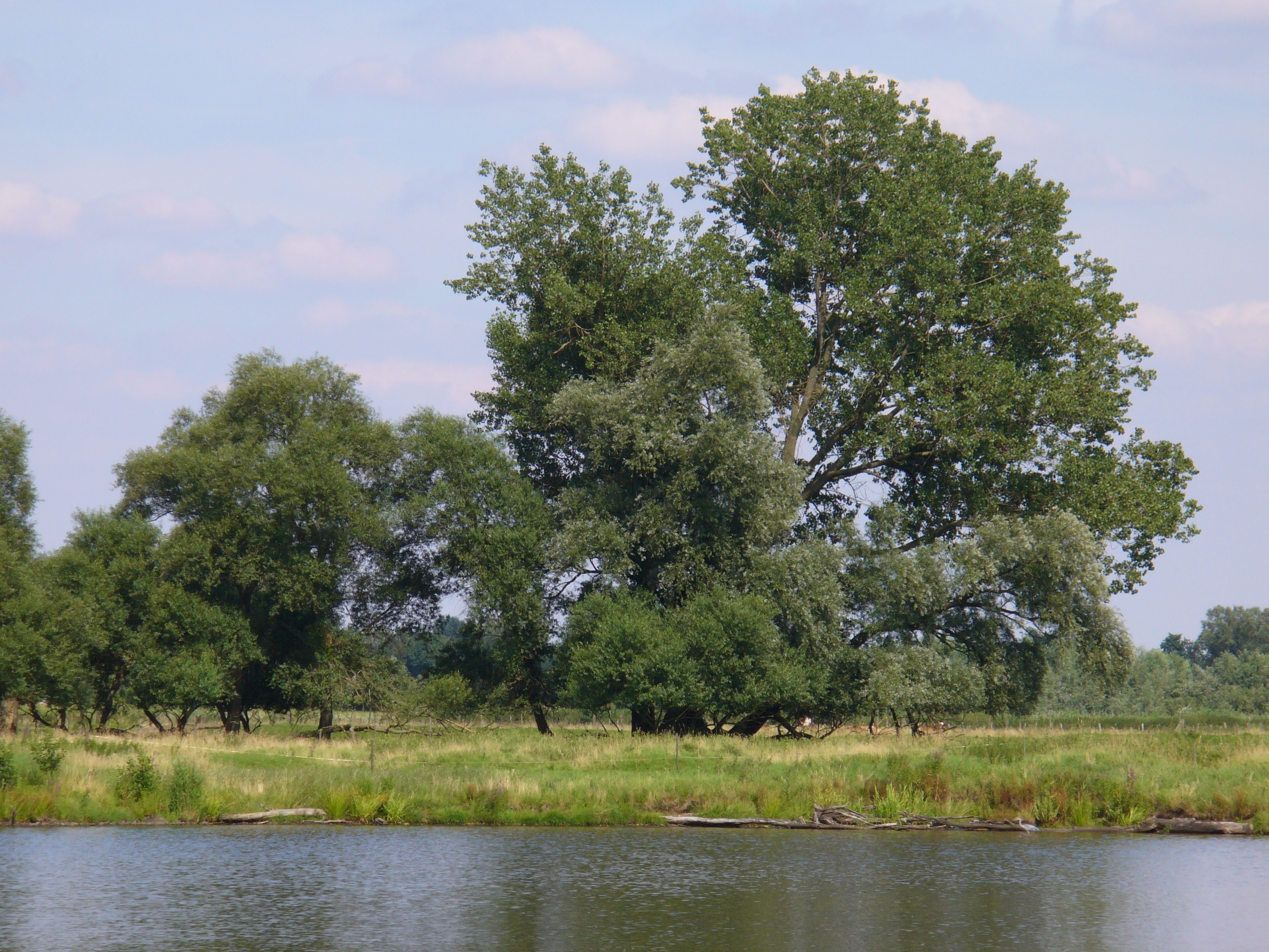 Blick auf das Naturschutzgebiet Westerweiden, Hamburg